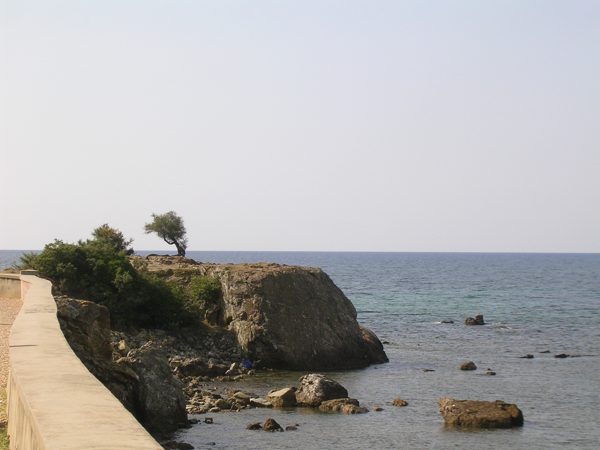 Livorno: lungomare presso Antignano